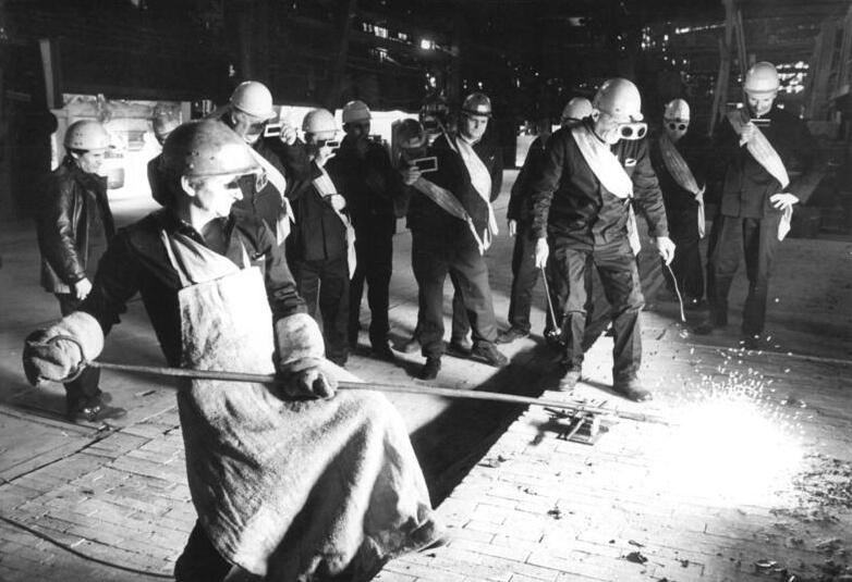 Riesa, Freundschaftsschmelze ADN-ZB Häßler 24.4.85-erd- Riesa: Freundschaftsschmelze Die 30-millionste Tonne Stahl, die das Stahl-und Walzwerk seit Gründung der DDR produzierte, wurde am Siemens-Martin-Ofen 8 des Betriebes abgestochen. Sie ist ein Ergebins der "Schmelze der Freundschaft und des Friedens", die Metallurgen aus der DDR, der CSSR, aus Polen, der UdSSR und Ungarn vereinte.